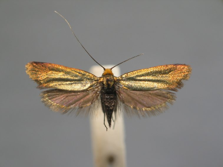 Adela cuprella